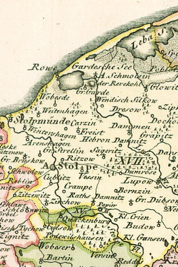 Landkarte der hinterpommerschen Ostseeküste zwischen Stolpmünde und Lebasee